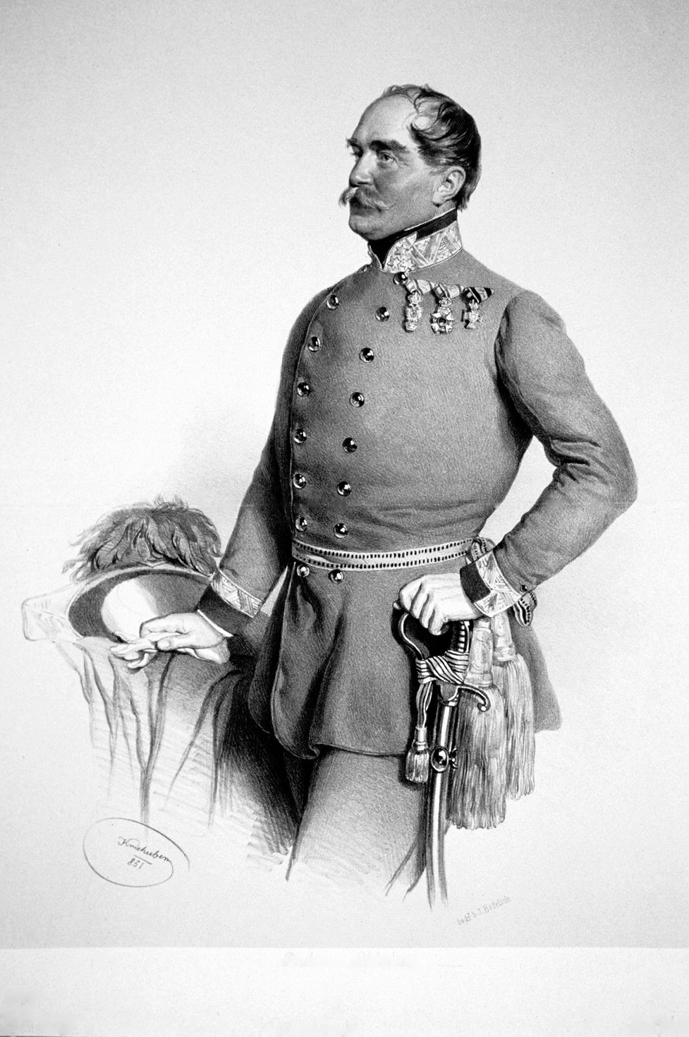 Vinzenz Freiherr von Schlechta-Wssehrd (1798-1879), Geheimrat, Feldmarschalleutnant, Lithographie von Josef Kriehuber, 1851